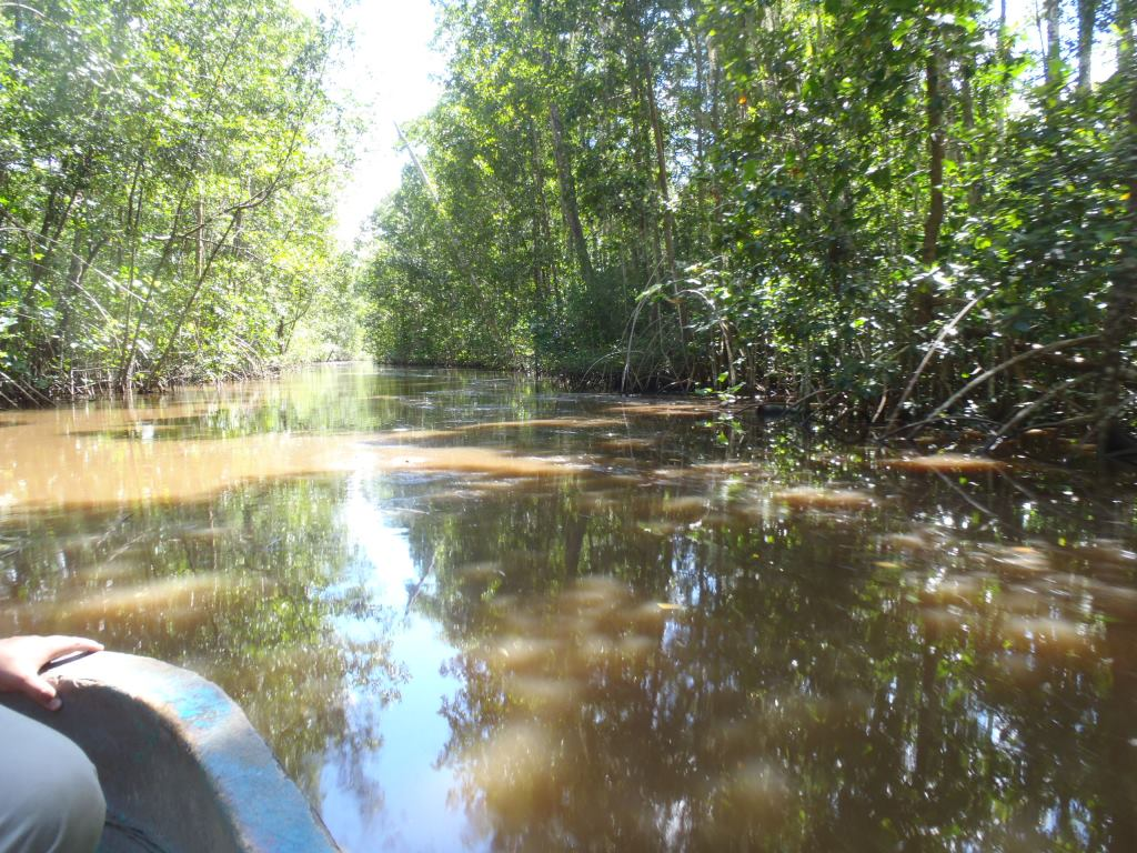 Parque nacional Turuépano, Se ubica al sur de la Península de Paria y al norte del río San Juan, sobre las llanuras cenagosas del Sistema Deltáico Turuépano-Guariquén, en el extremo occidental del Golfo de Paria, Municipio Benítez del Estado Sucre.